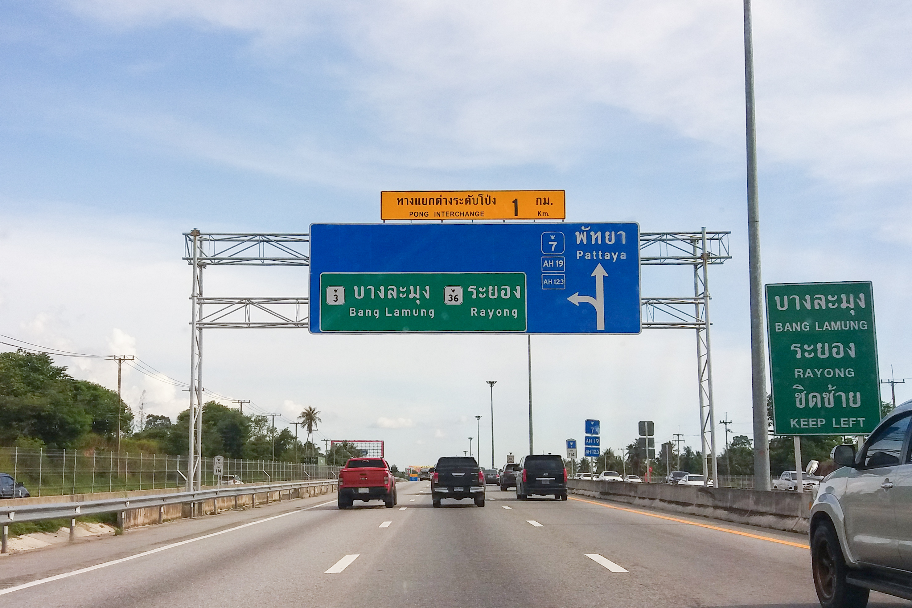 Head to Pattaya